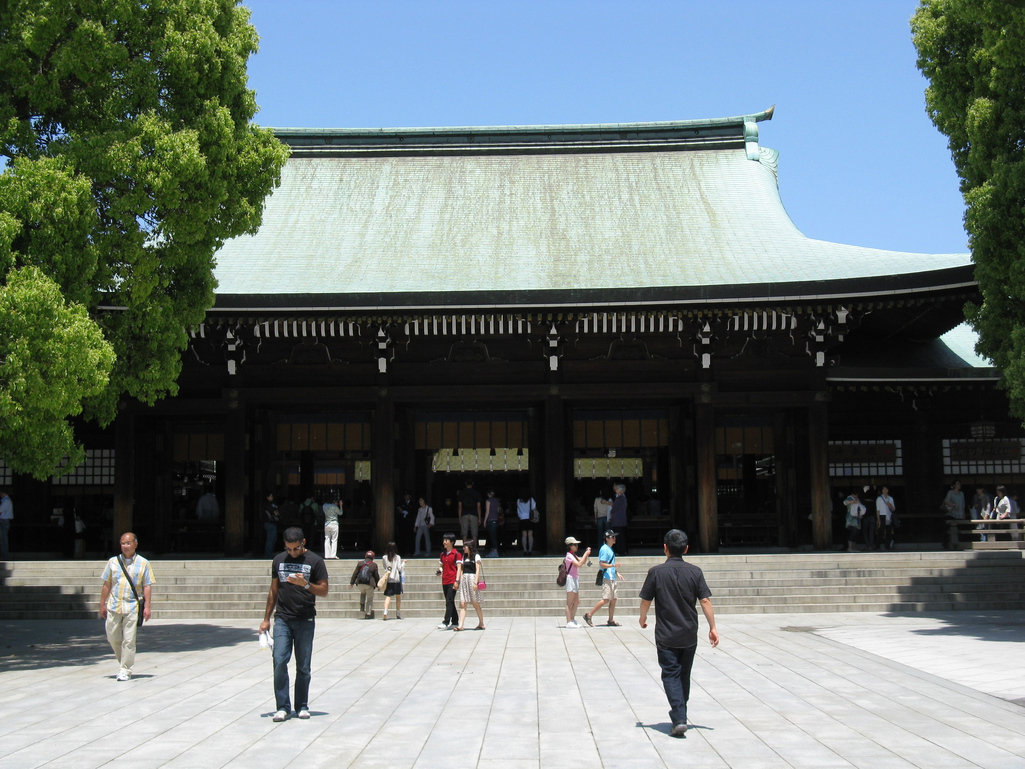 明治神宮 外拝殿